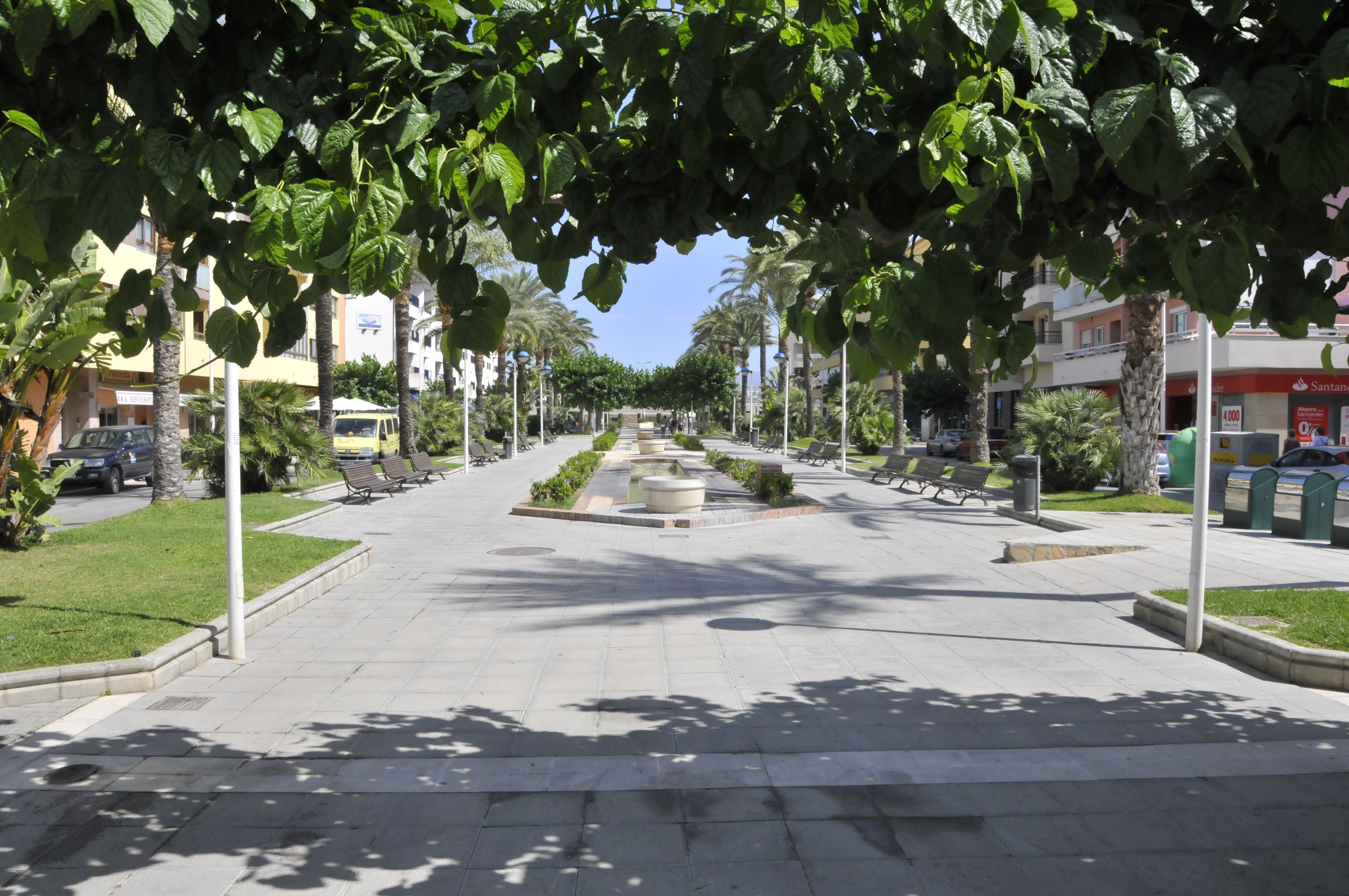 Moraira, Avd. de la Paz